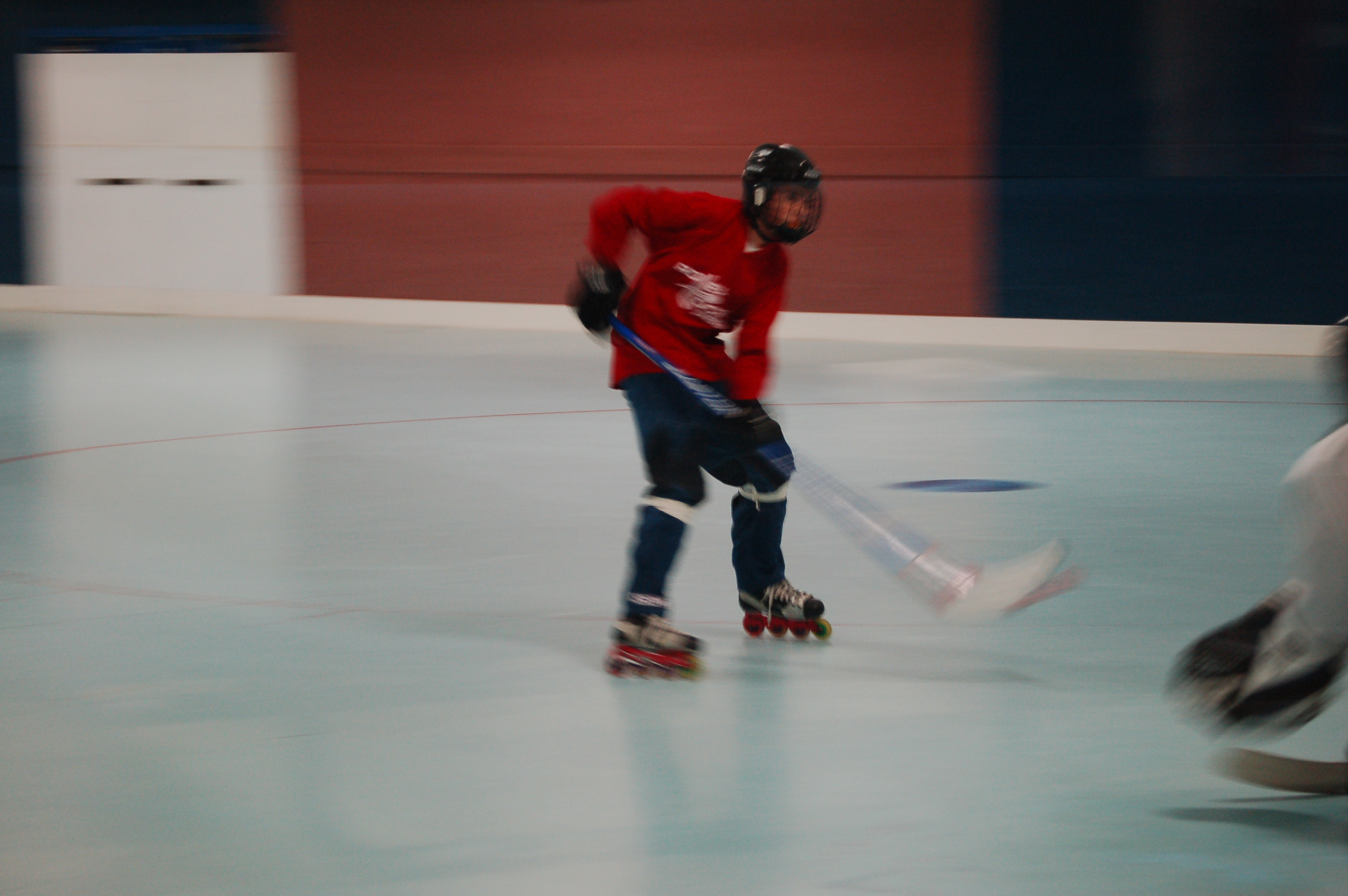 Inline Hockey at Albuquerque